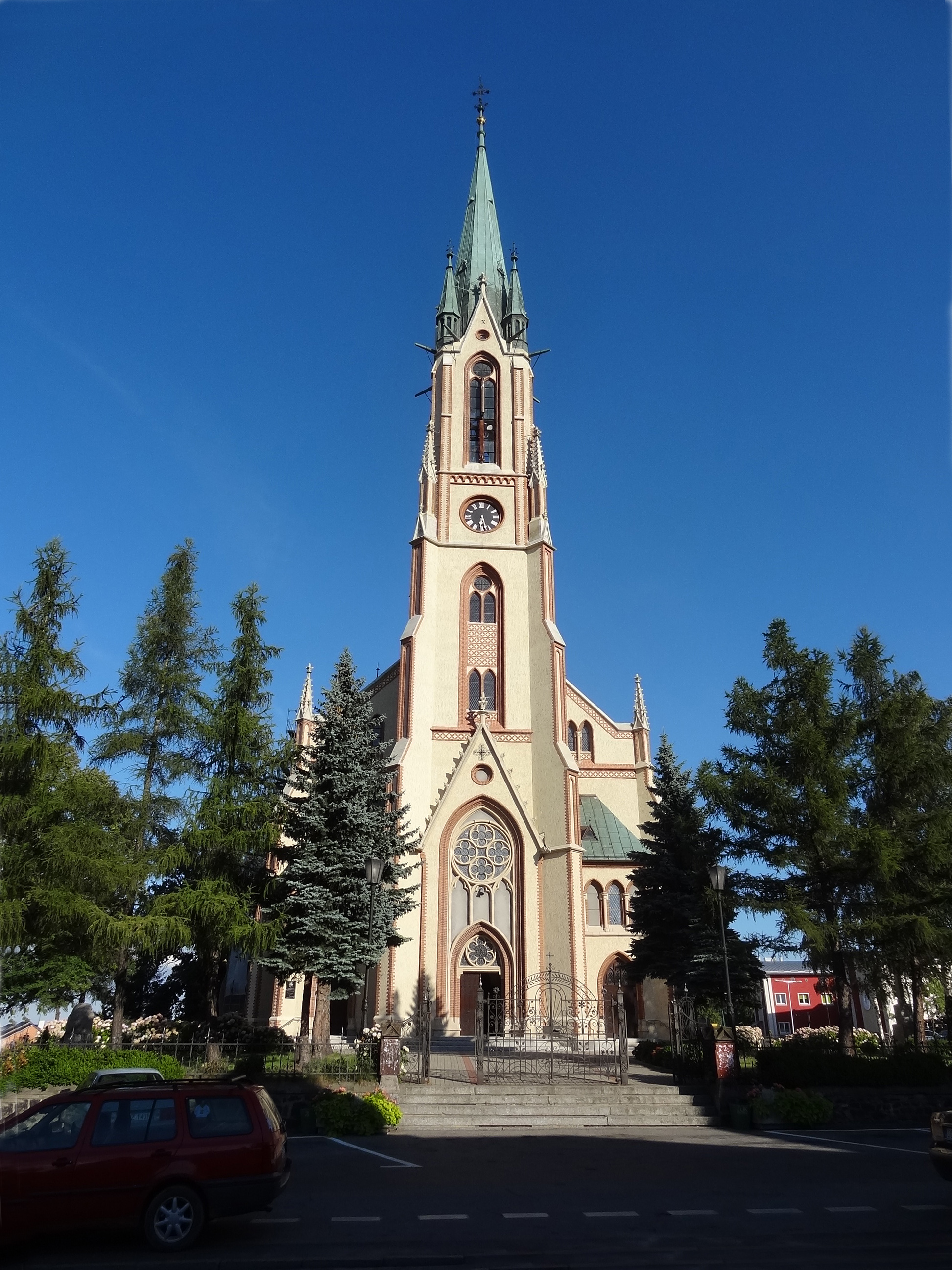 Kościół parafialny św. Antoniego z Padwy w Pieszycach